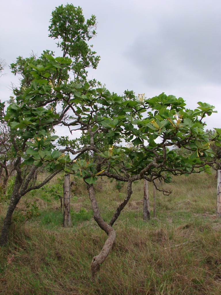 Tocoyena formosa - RUBIACEAE Parque Estadual da Serra dos Pirineus - Pirenópolis - Goiás - Brasil